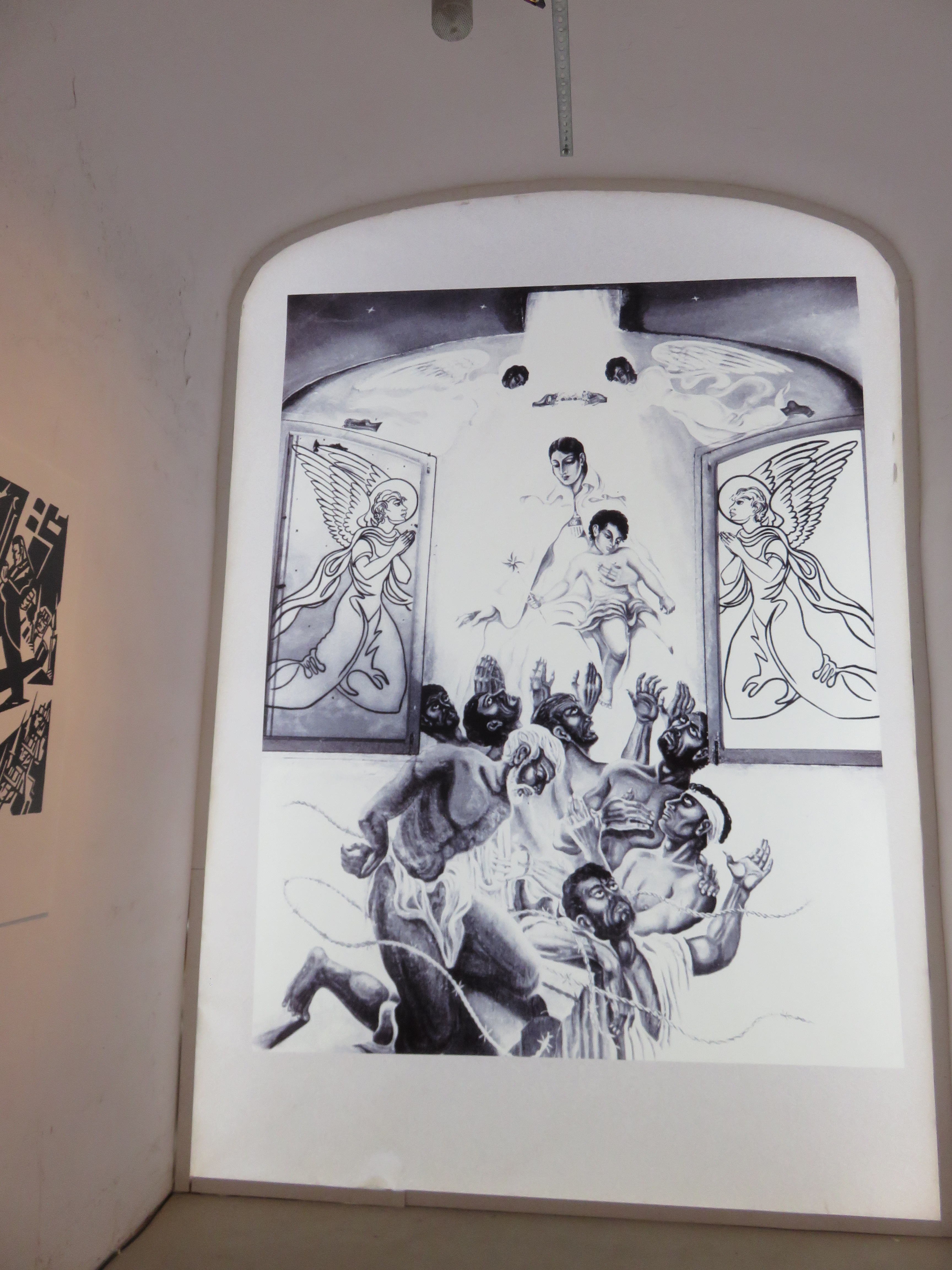 Reproducció dels frescos d'Helios Gómez conegut com "La Capella Gitana" per a l'exposició "La Model ens parla".